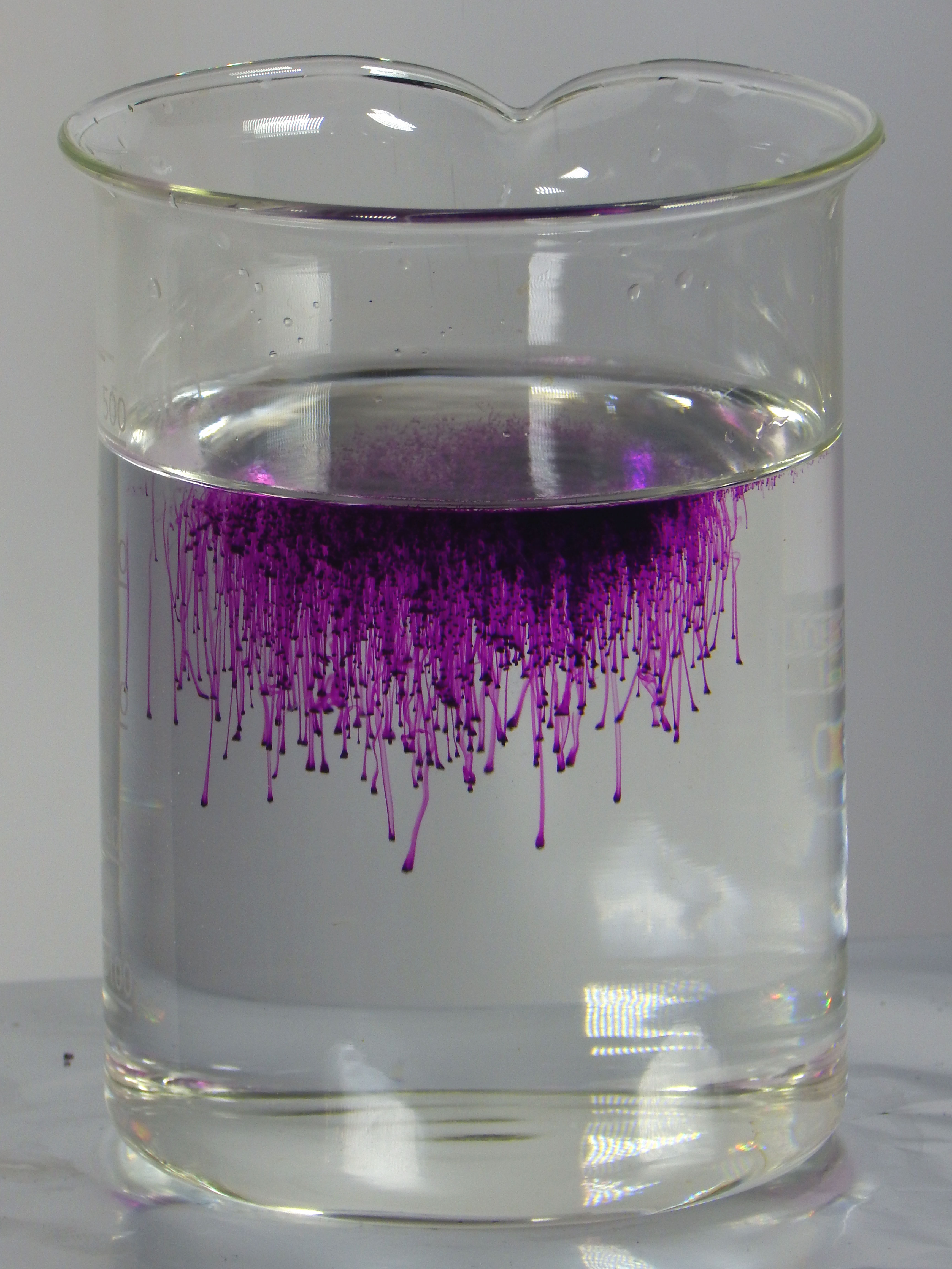 Difuzija kalijum-permanganata u vodi